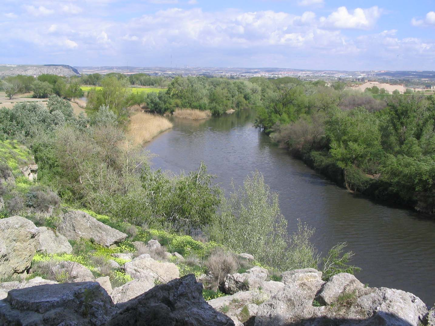 Desembocadura del río Manzanares en el Jarama (Comunidad de Madrid, España).